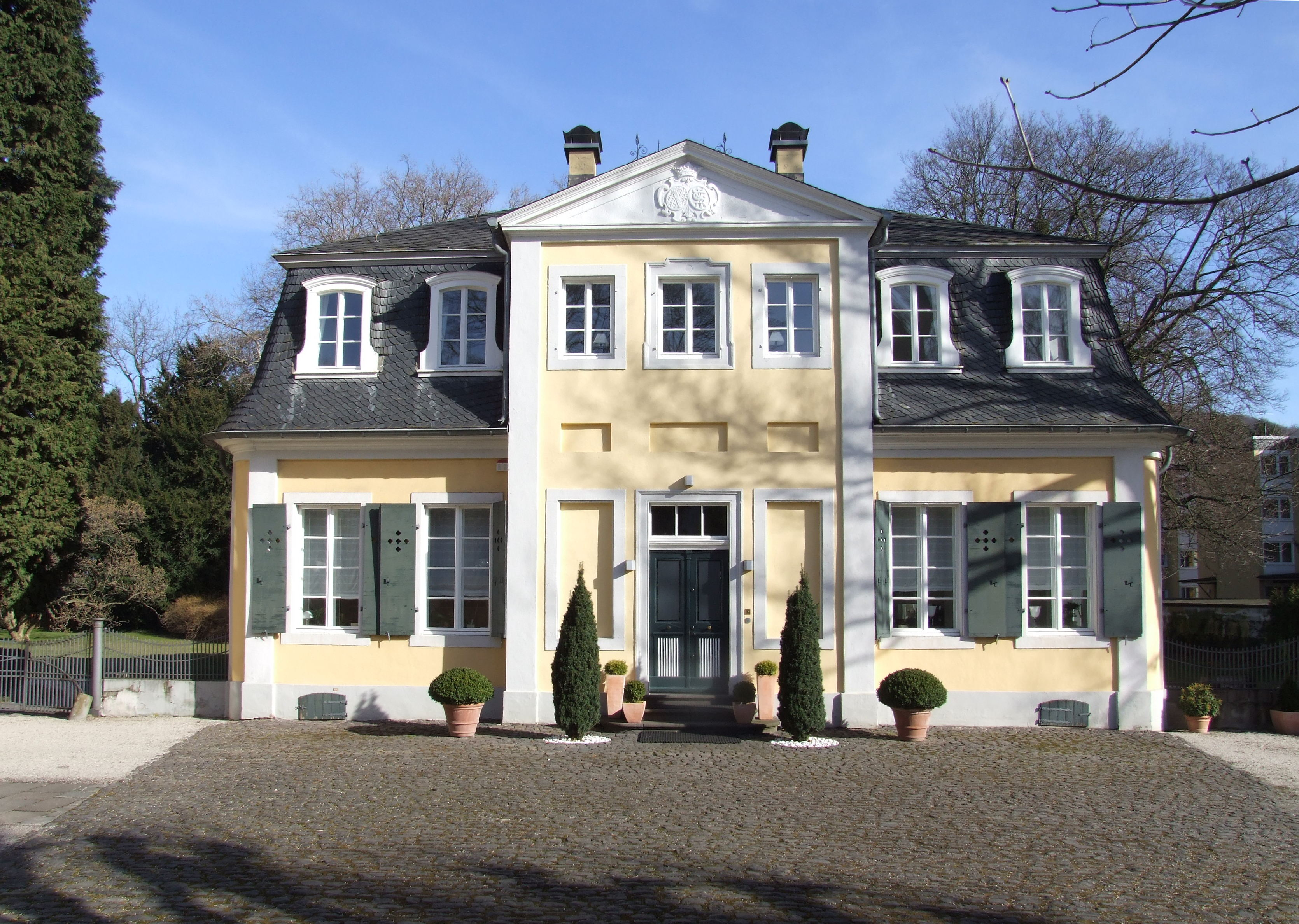 Lippesches Landhaus in Oberkassel, erbaut nach Plänen von Johann Conrad Schlaun zwischen 1750 und 1760 für die Kölner Familie von Meinertzhagen